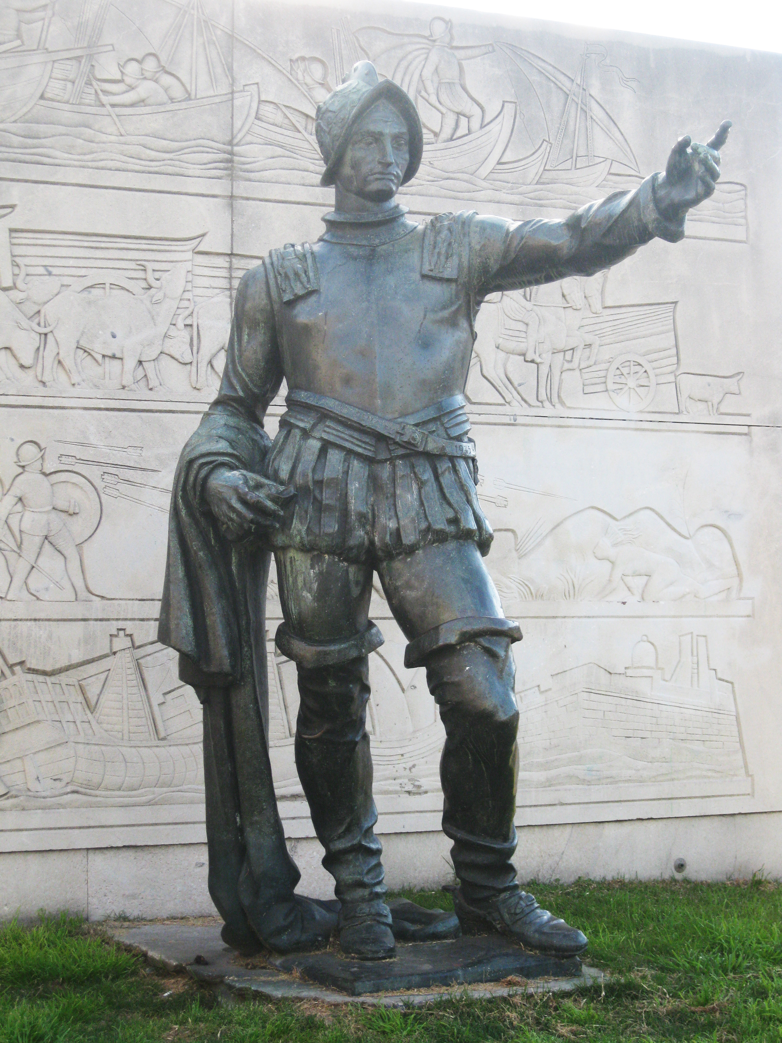 Hernandarias. Ubicada en el departamento de Montevideo